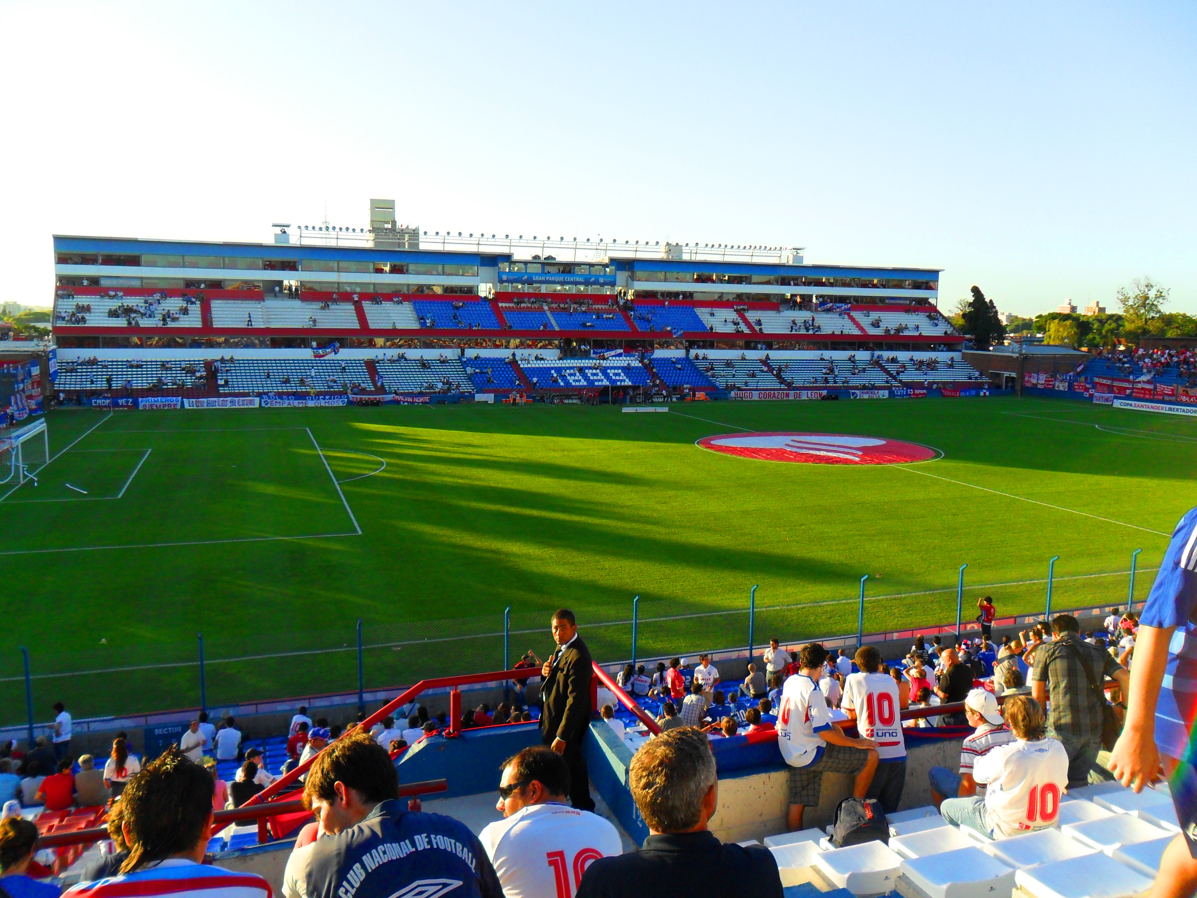 Imagen del estadio Gran Parque Central, una hora antes del encuentro a disputarse por la Copa Santander Libertadores 2011 entre Nacional y Argentinos Jrs.